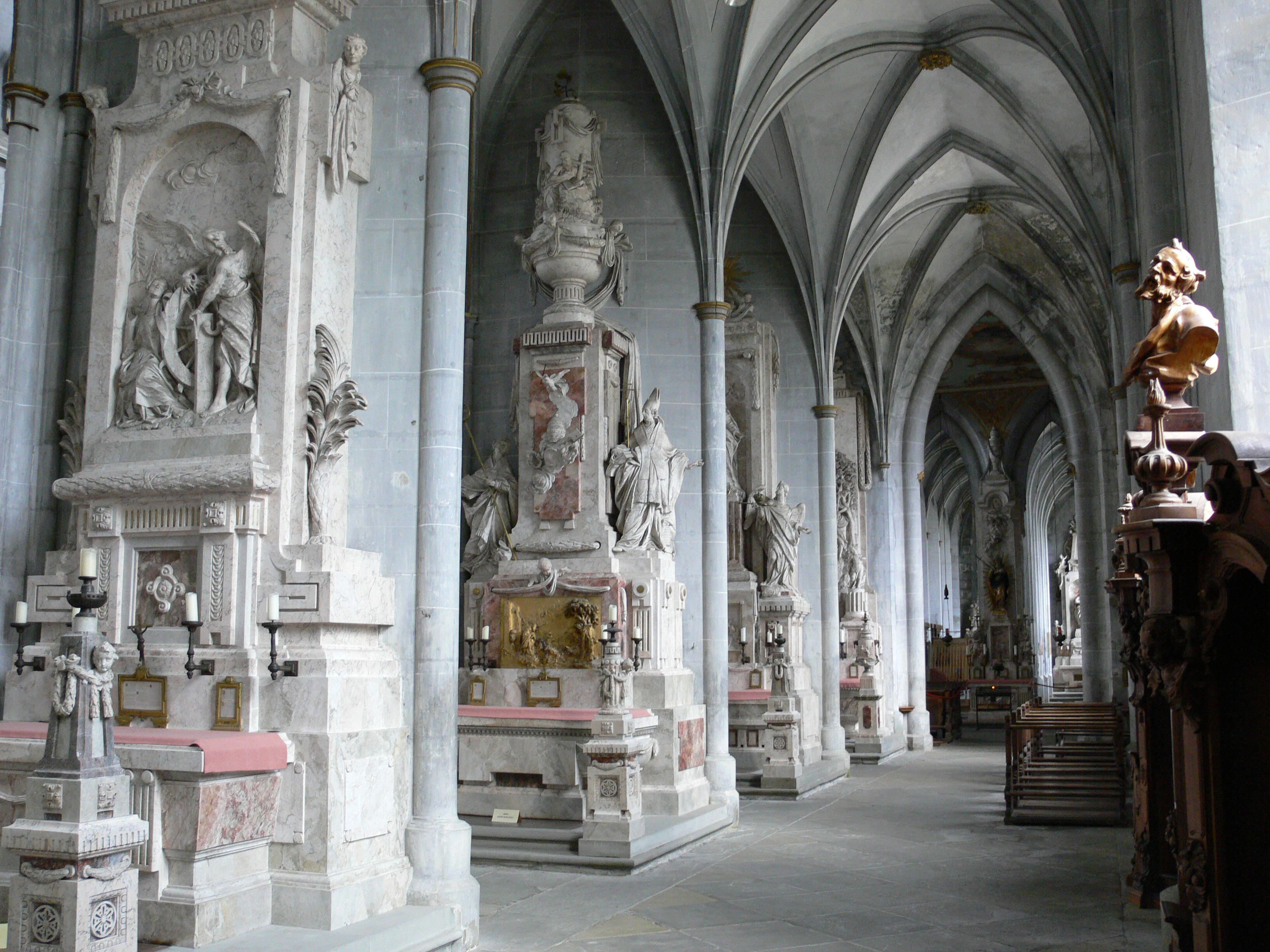 Description: Rechtes Seitenschiff Source: User:Saberhagen Location: Salemer Münster, Salem (Baden), Germany Source: own photograph by uploader